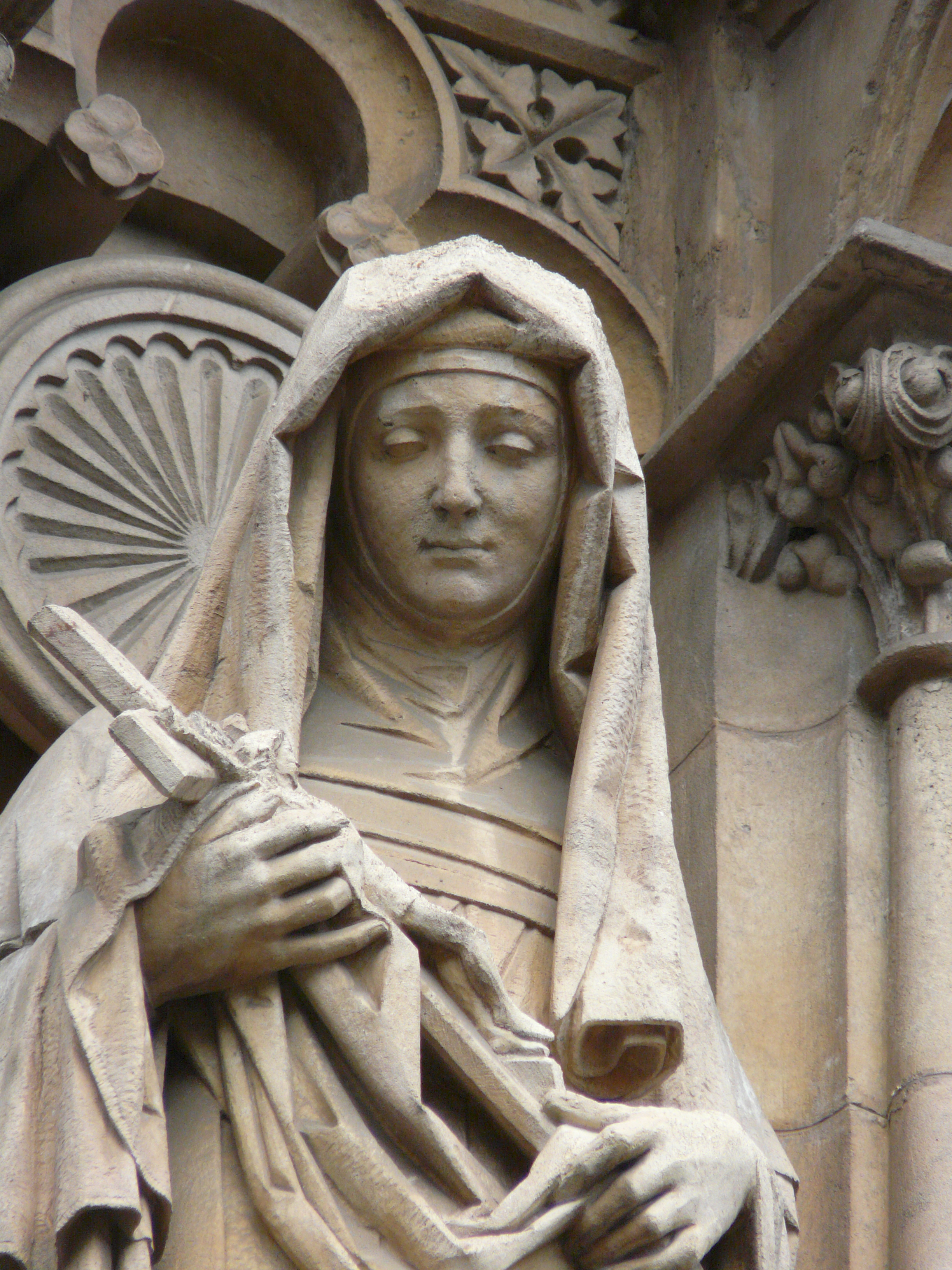 Església i Convent de les Saleses (Barcelona) Object location41° 23′ 53.97″ N, 2° 10′ 17.86″ E